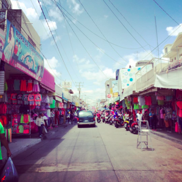 Av. 16 de Septiembre en la Zona Comercial Textil de Uriangato